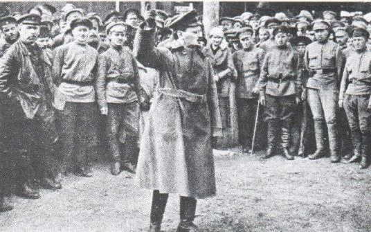 Лев Троцкий в 1918 году